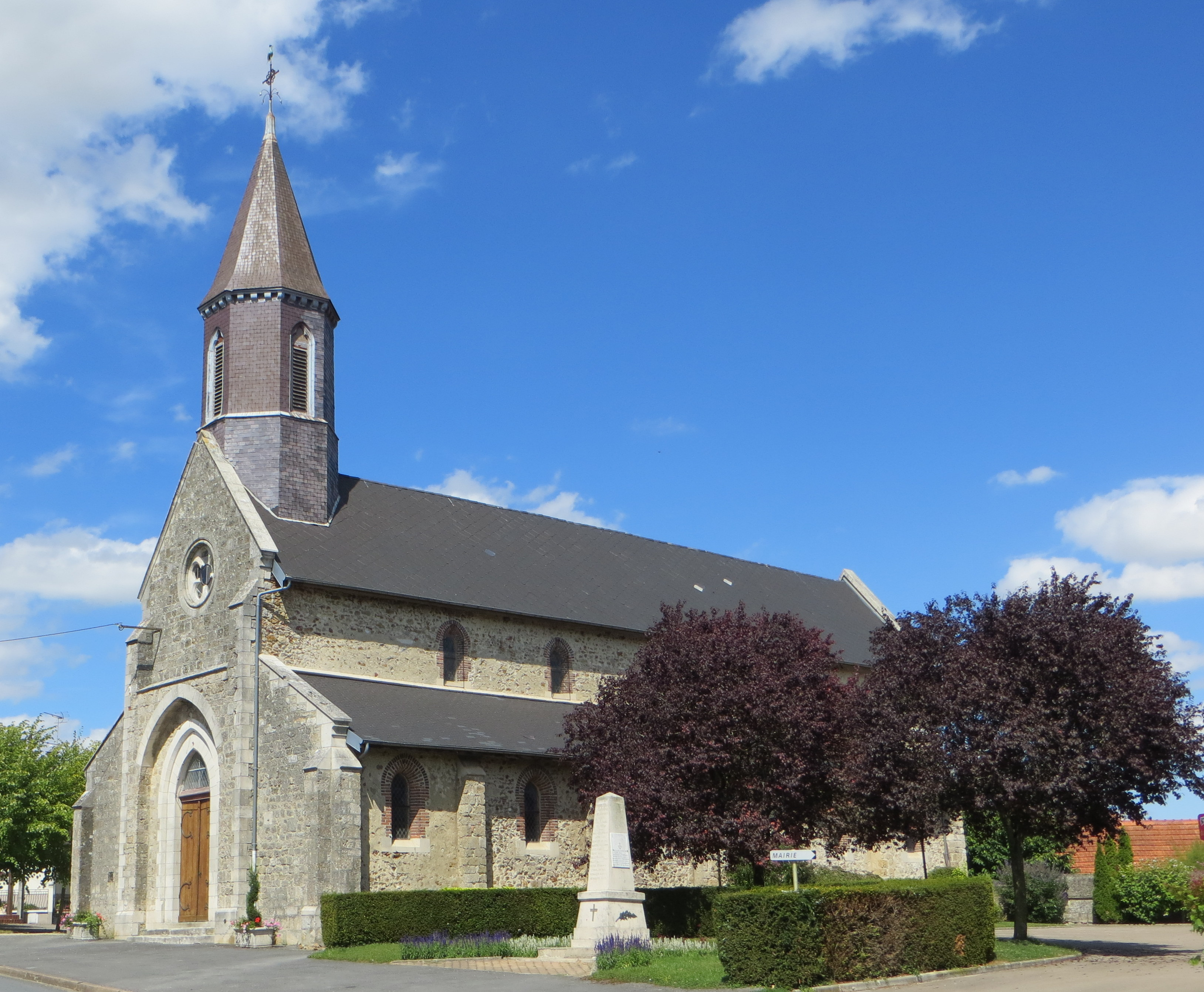 Vue générale de l'église